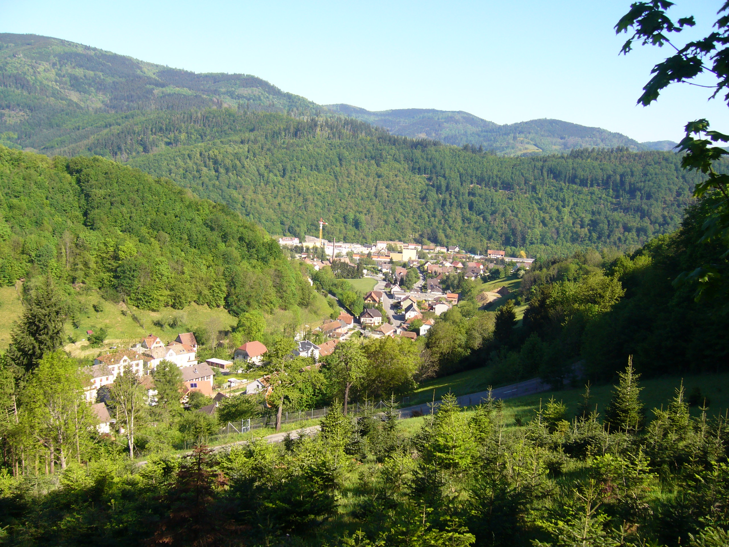 Sainte Marie-aux-Mines depuis les hauteurs de Fertrupt